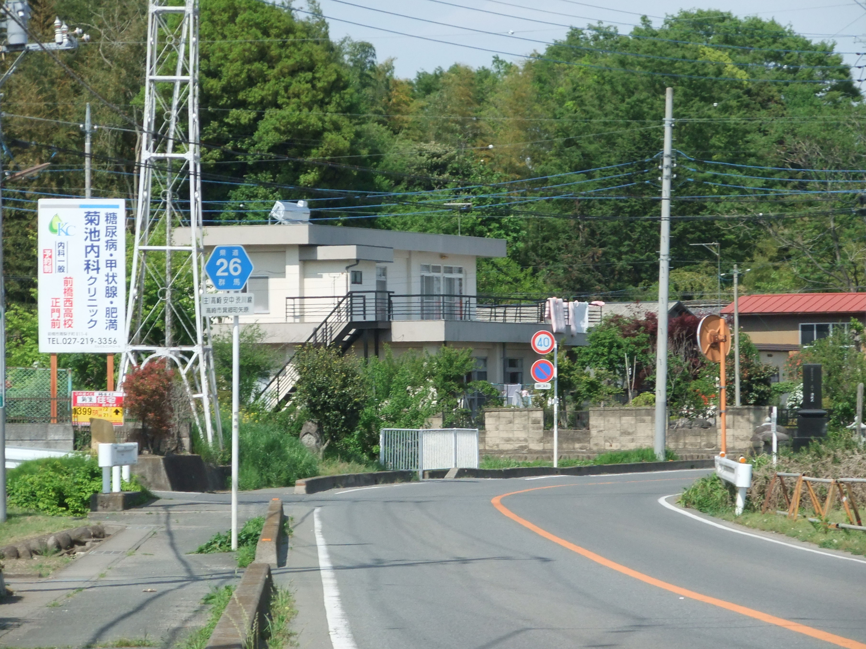 群馬県道26号の高崎市箕郷町付近。渋川方面に向けて撮影。